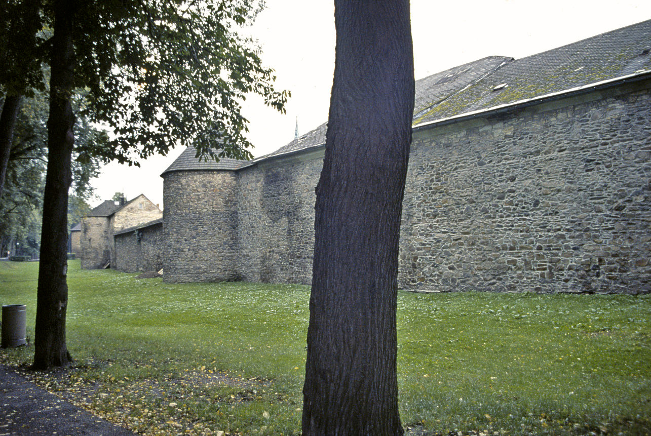 Polička, Okres Svitavy, Czech Republic: city wall